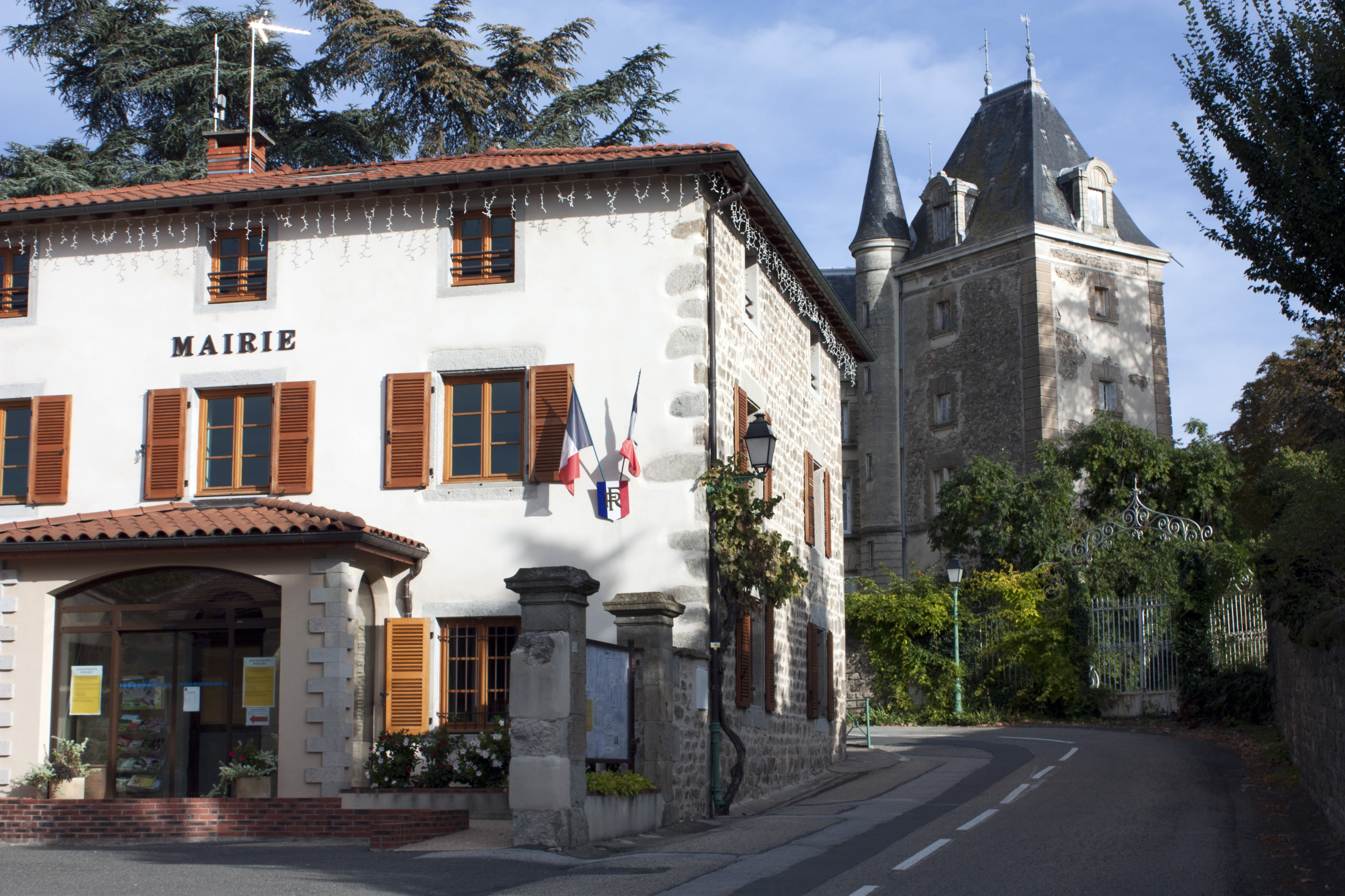 Mairie